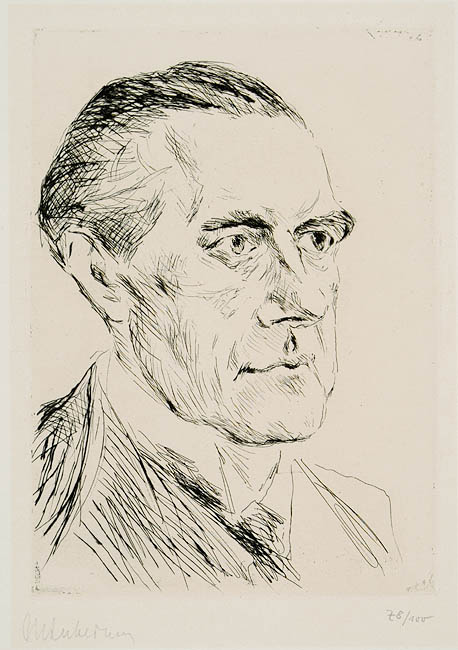 Max Liebermann: Porträt Peter Behrens, 1923; Radierung auf Karton, 20.8 x 15 cm